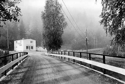 Butiken i Skillingsfors i djupaste Värmland är en av de tidiga Konsumbutiker